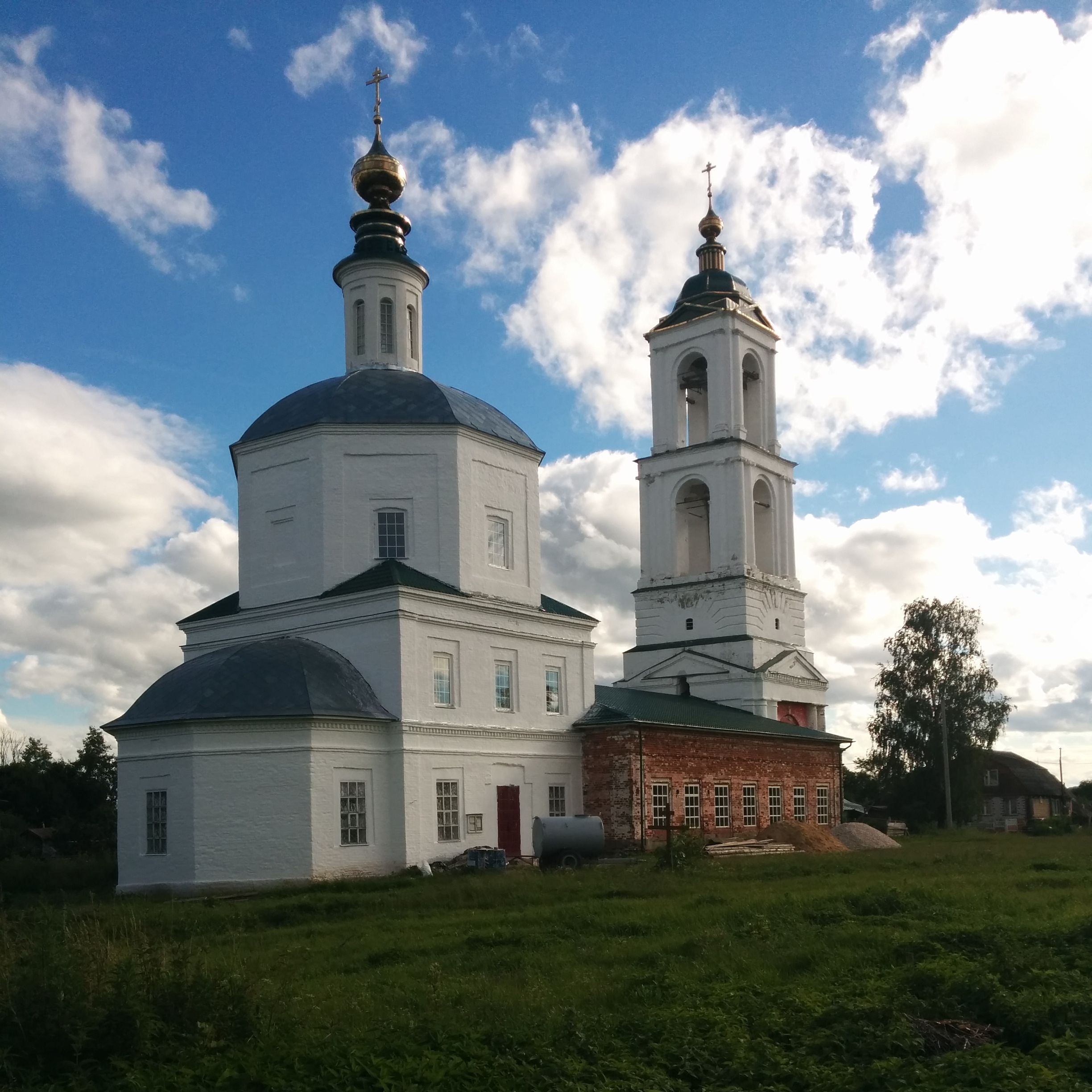 Церковь Преображения с колокольней: Добрынское, Суздальский район, Владимирская область